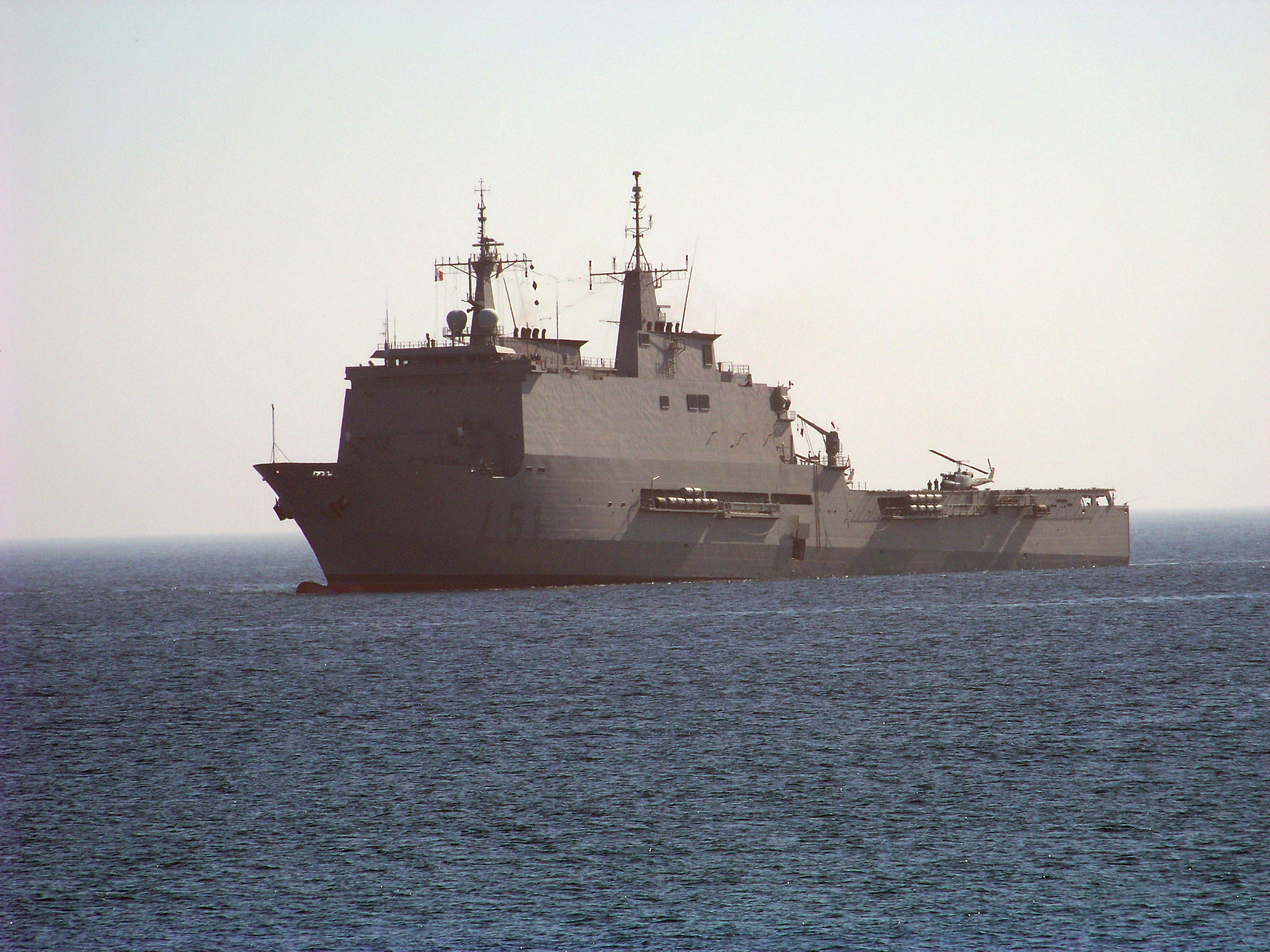 Buque de aslto anfibio(L-51) Galicia durante la exhibicion aeronaval realizada en Santander con motivo de la celebracion del dia de las Fuerzas Armadas 2009.